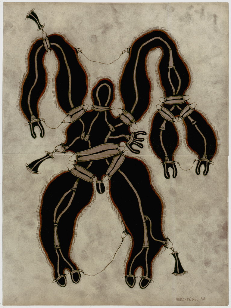 Zeichnung 1998